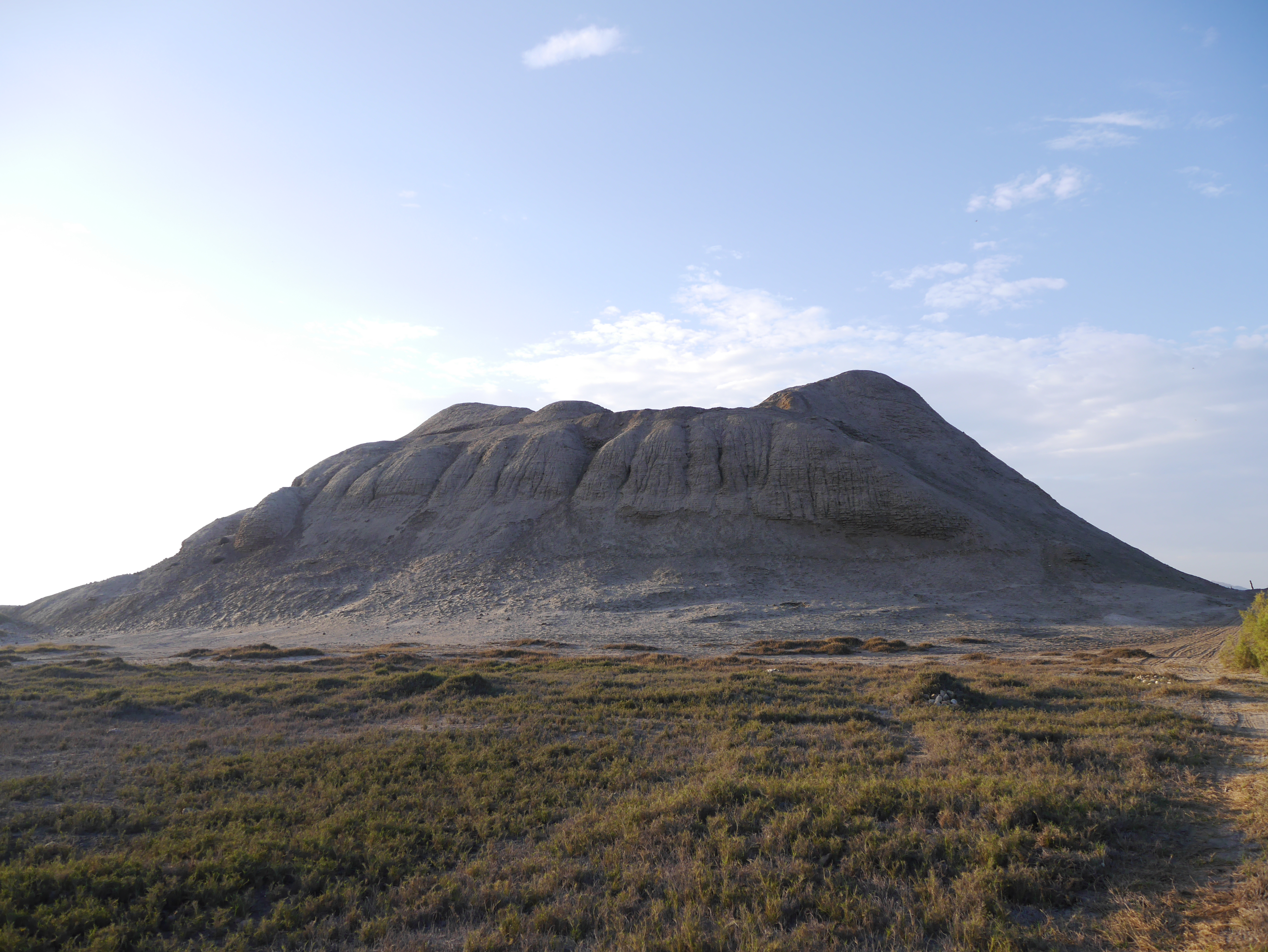 ZONA ARQUEOLÓGICA MONUMENTAL, HUACA DOS CABEZAS (900 d.C; 1475 d.C)